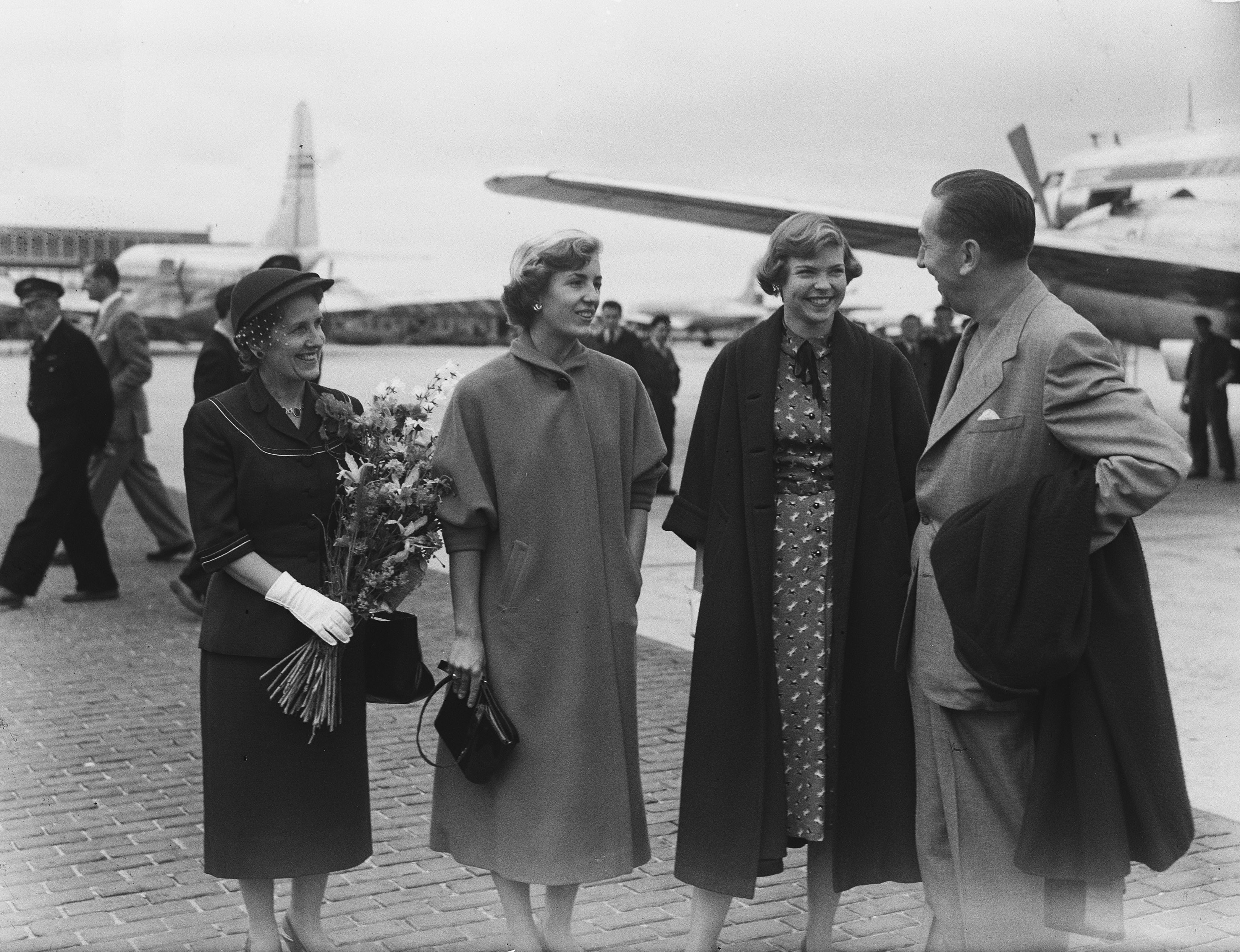 Bezoek Walt Disney aan Amsterdam. Aankomst Walt Disney op Schiphol, met echtgenote Lillian en twee dochters Sharon en Diane